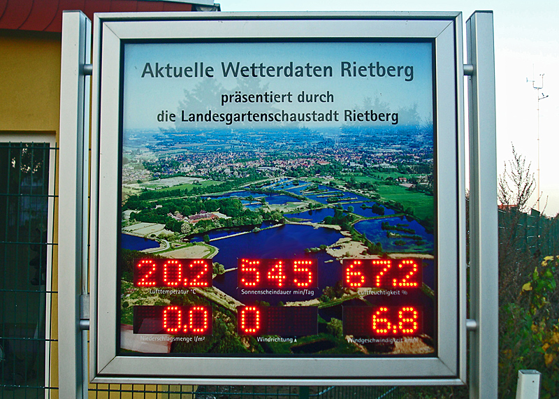 Wetterdaten in Rietberg auf dem Landesgartenschaugelände